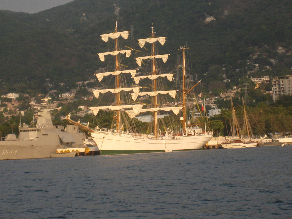 Buque Escuela Cuauhtémoc (ARM Cuauhtémoc BE-01) en Acapulco, Guerrero, México (Descripción original en Flickr): Creo que se llama Cuahutemoc, este es el barco que se ve desde la casa de Albert.